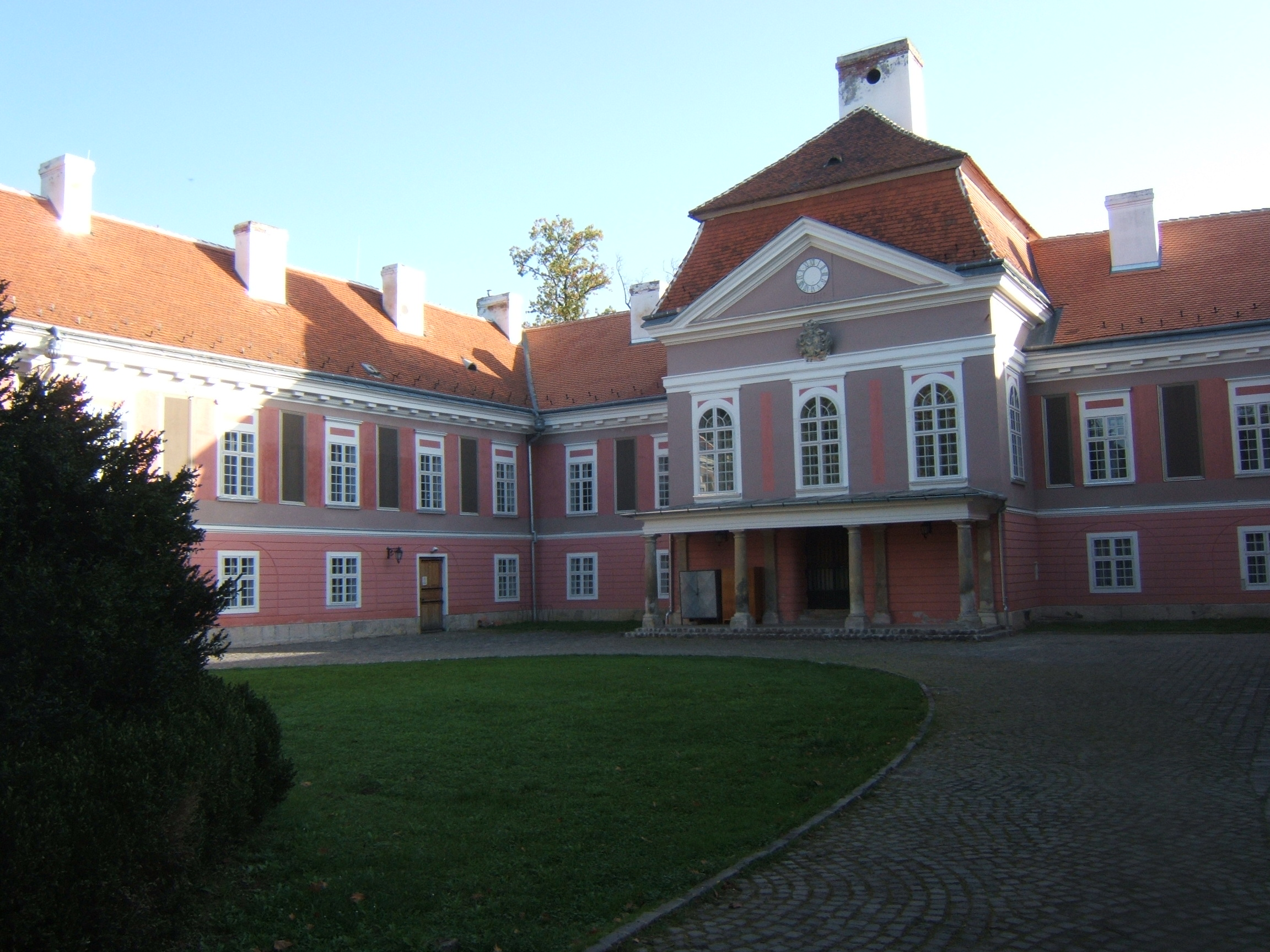 Inkey-kastély, Iharosberény